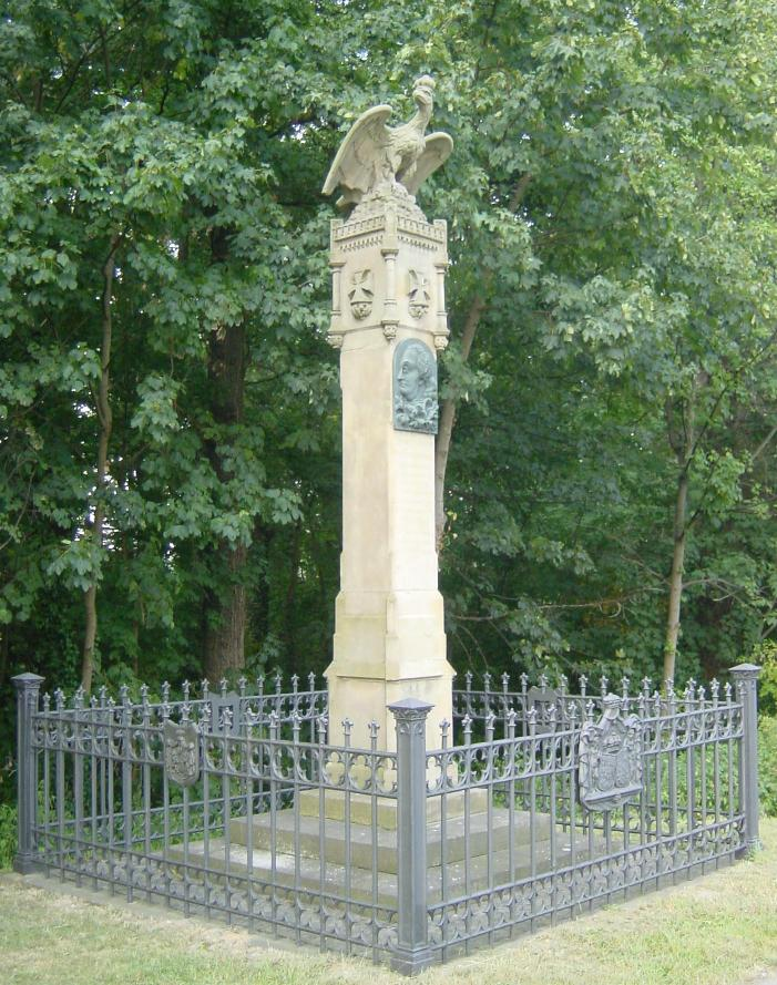 Bildbeschreibung: Bildbeschreibung: Denkmal Hückelsmay, Krefeld Quelle: selbst fotografiert Fotograf/Zeichner: DER UNFASSBARE